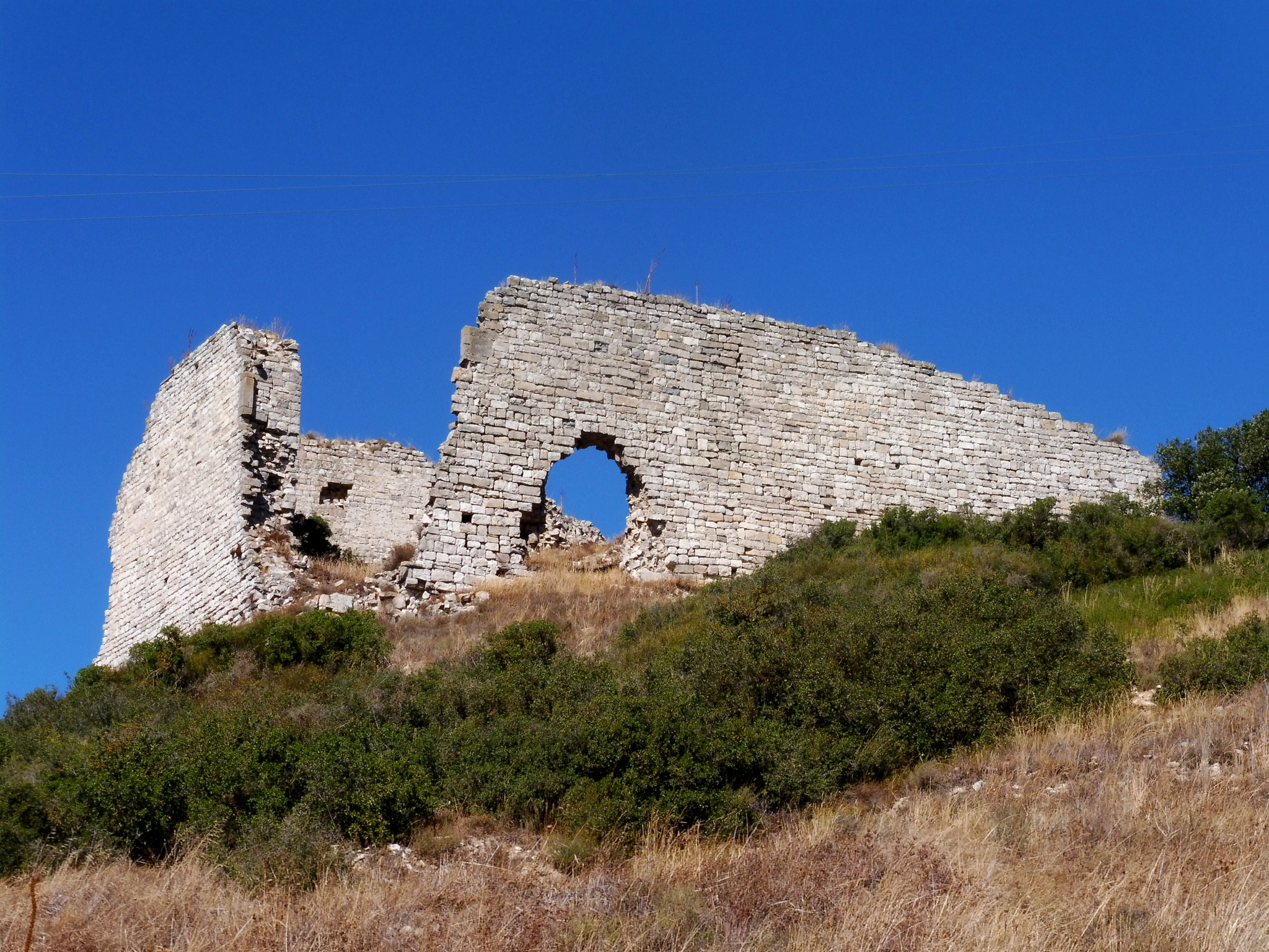 Castell de la Guàrdia Lada (Montoliu de Segarra)